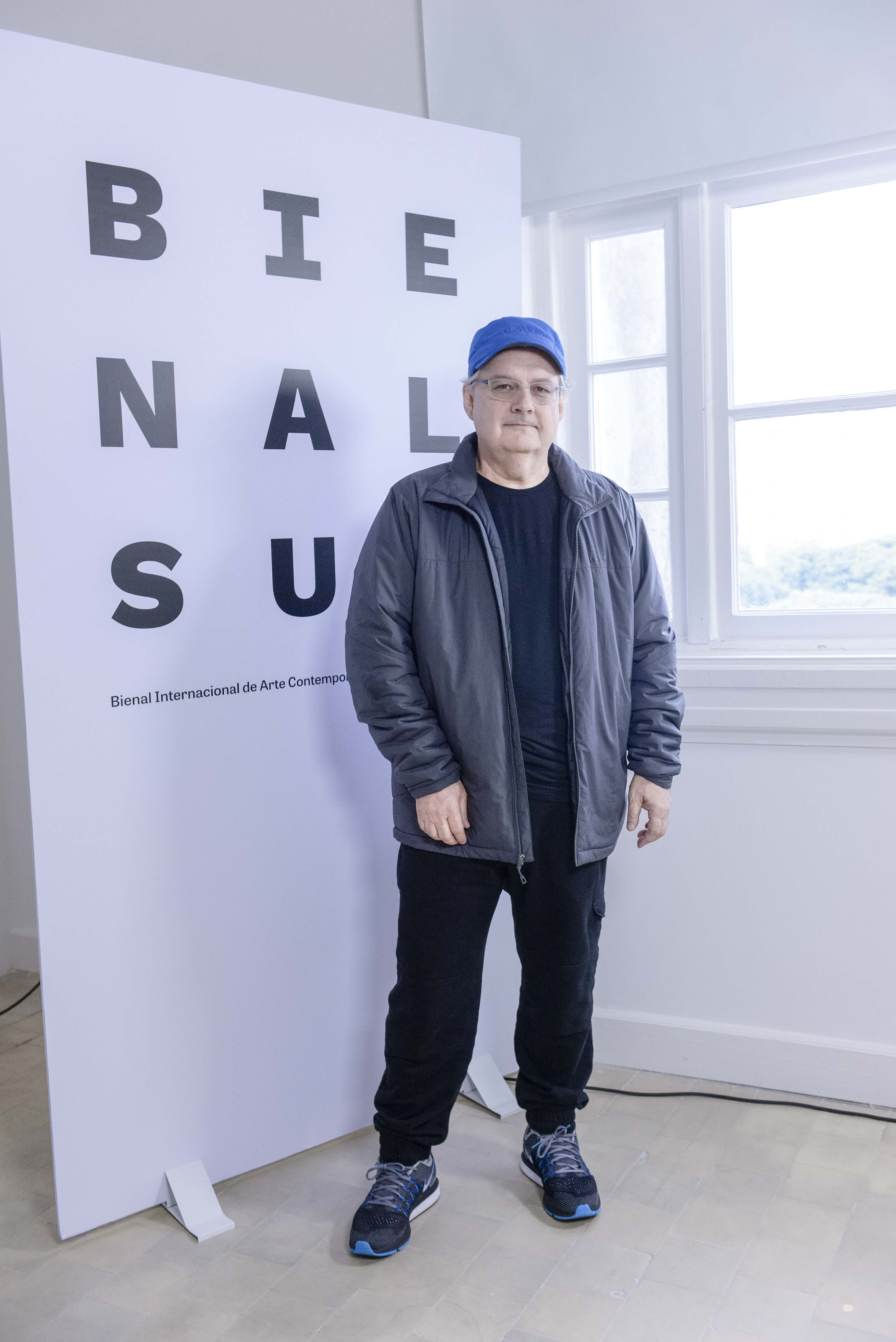 Fotografías de los invitados y participantes de la Bienal Sur 2016, realizada por la Universidad de Tres de Febrero.